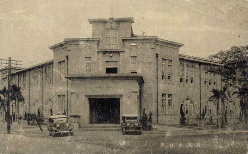 日治時期的屏東市役所，之前是屏東街役場